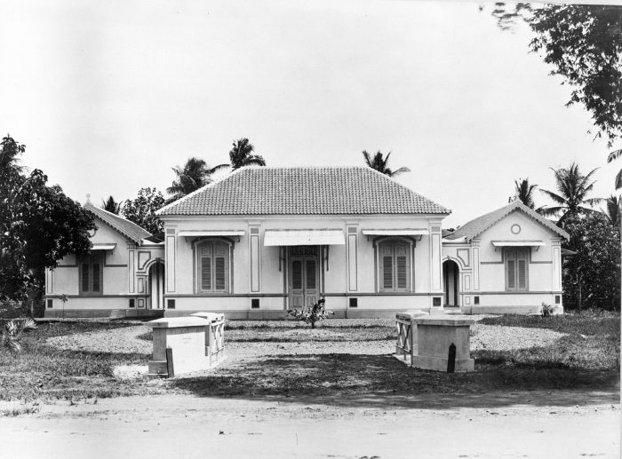 Foto. Kantoor van de Landraad in Soerakarta.